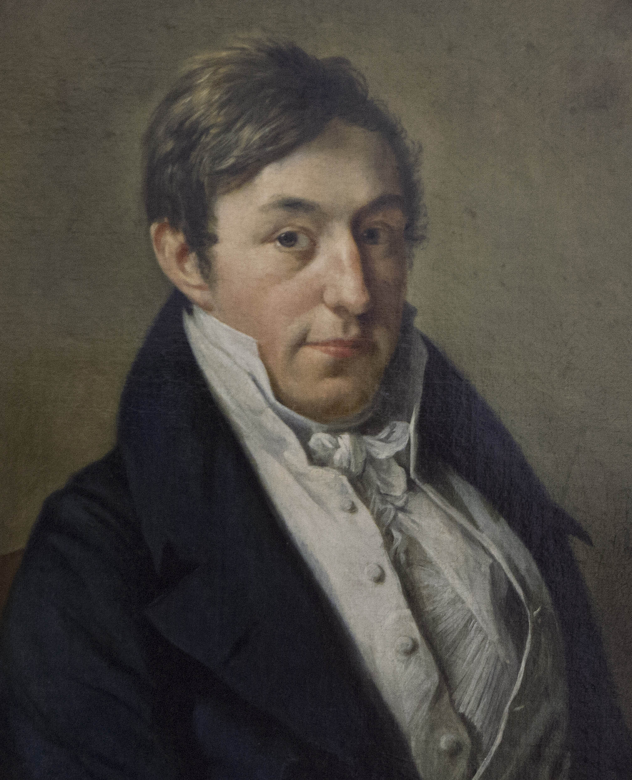 Cornelius Joannes de Bruyn Kops